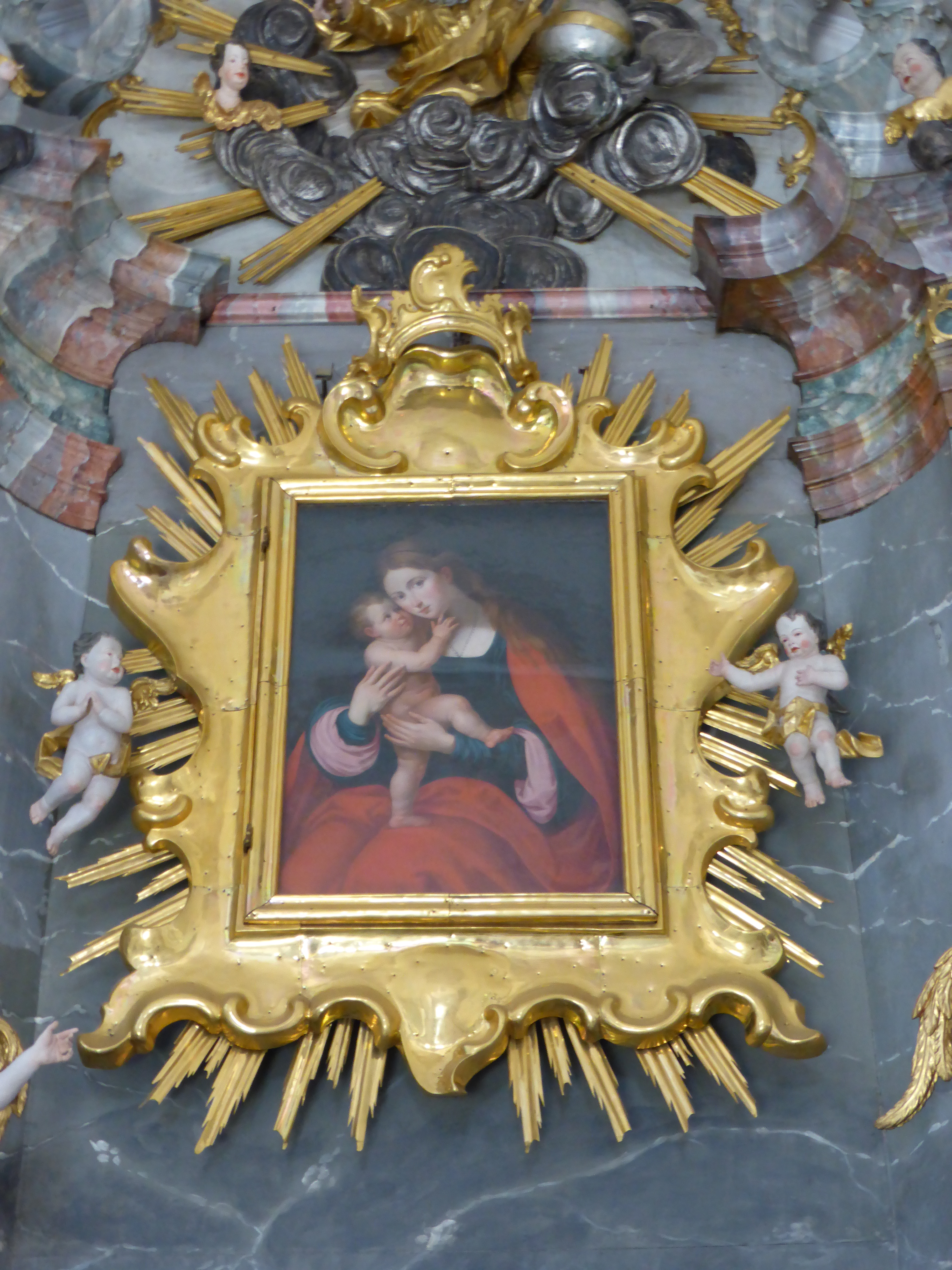 Gnadenbild Maria Hilf Dominikanerkirche Landshut